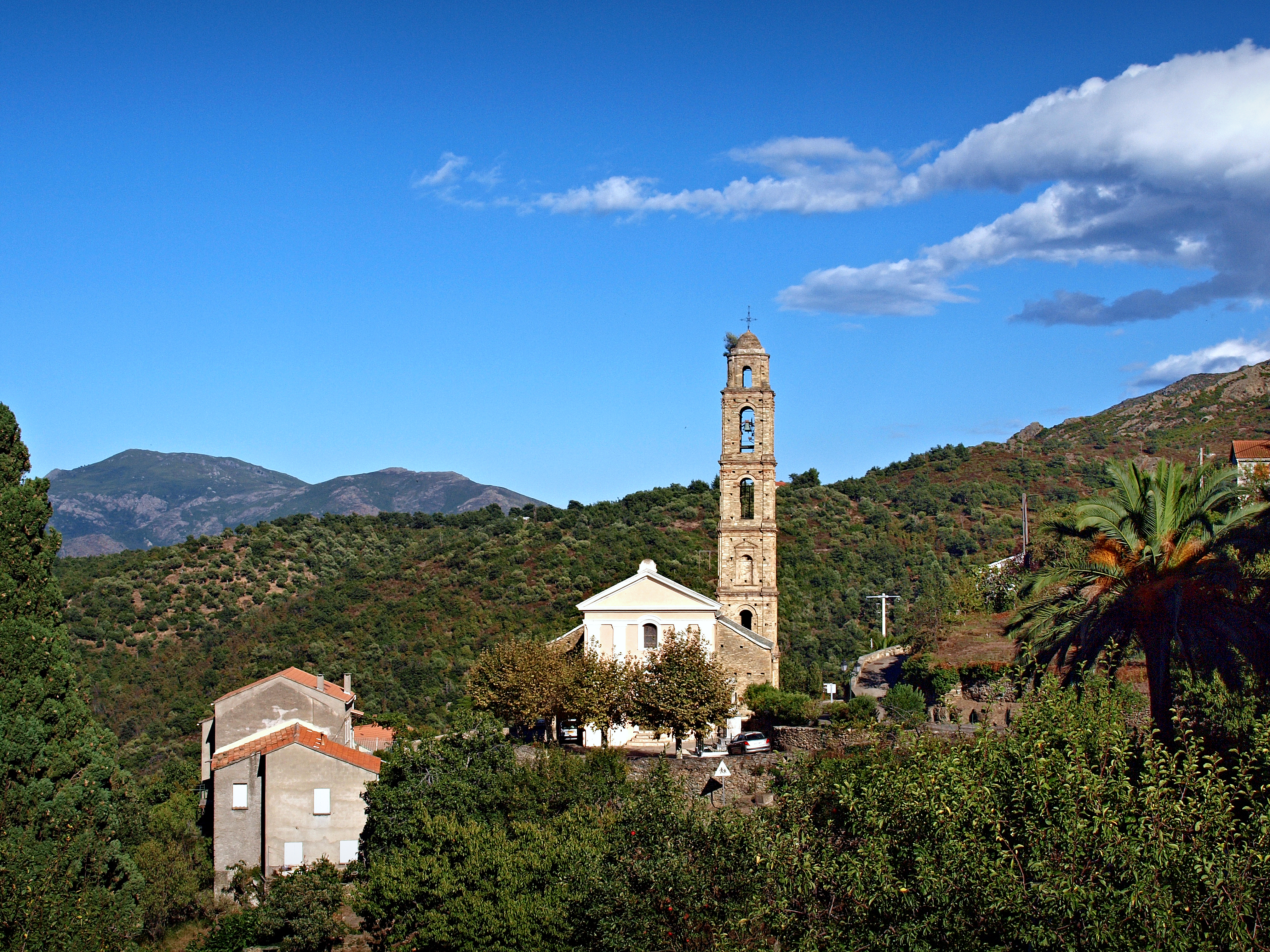 Soriu, Nebbio (Corse) - Église San Filippu Neri (1622), classée MH